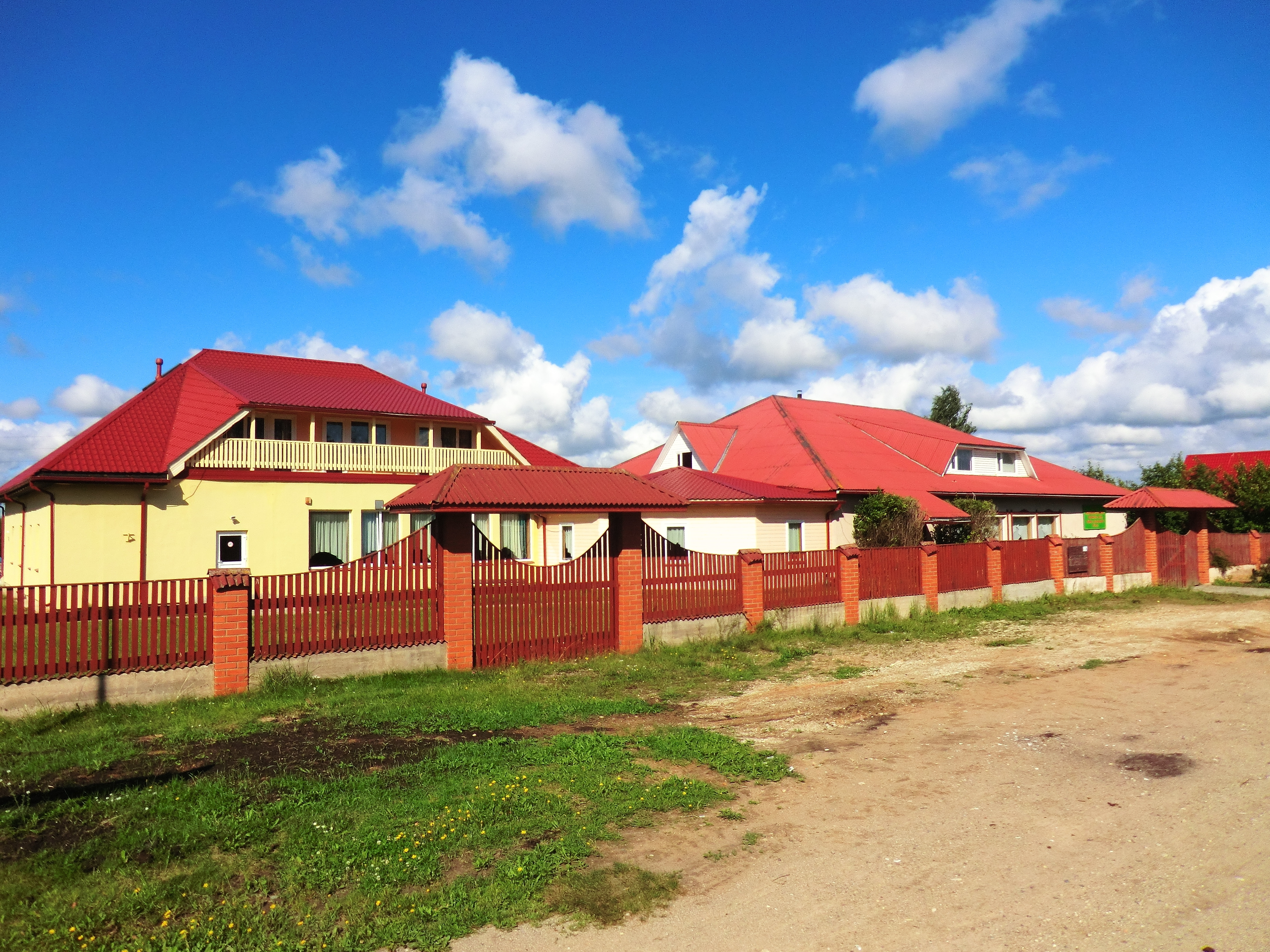 гостевой дом